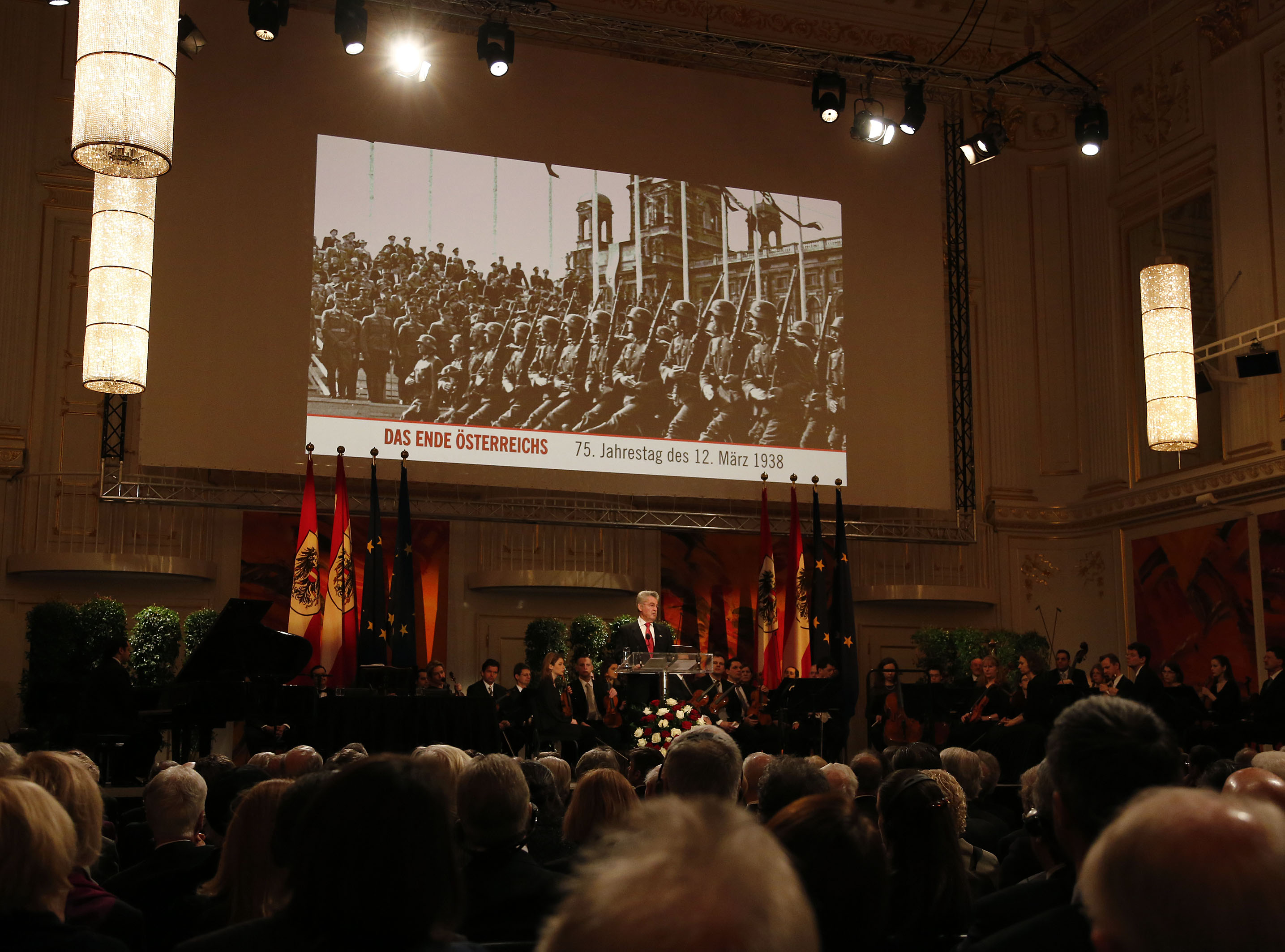 Rede von BP Heinz Fischer am Gedenkakt zum 75. Jahrestages des 12. März 1938, Hofburg, Wien, 13.03.2013, Foto: Dragan Tatic